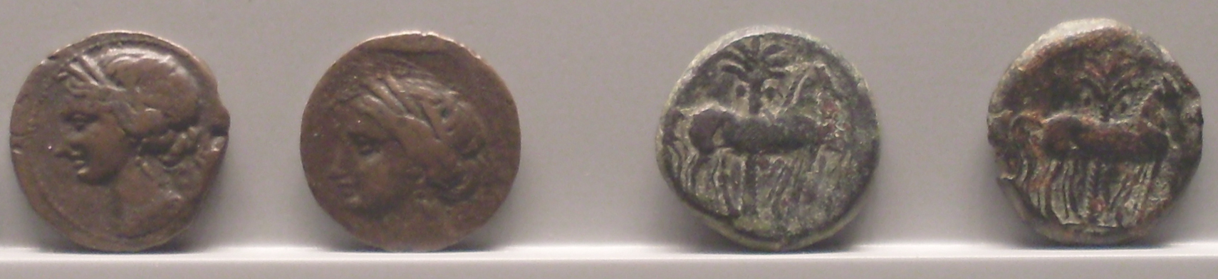 Monnaie Punique Tunisie